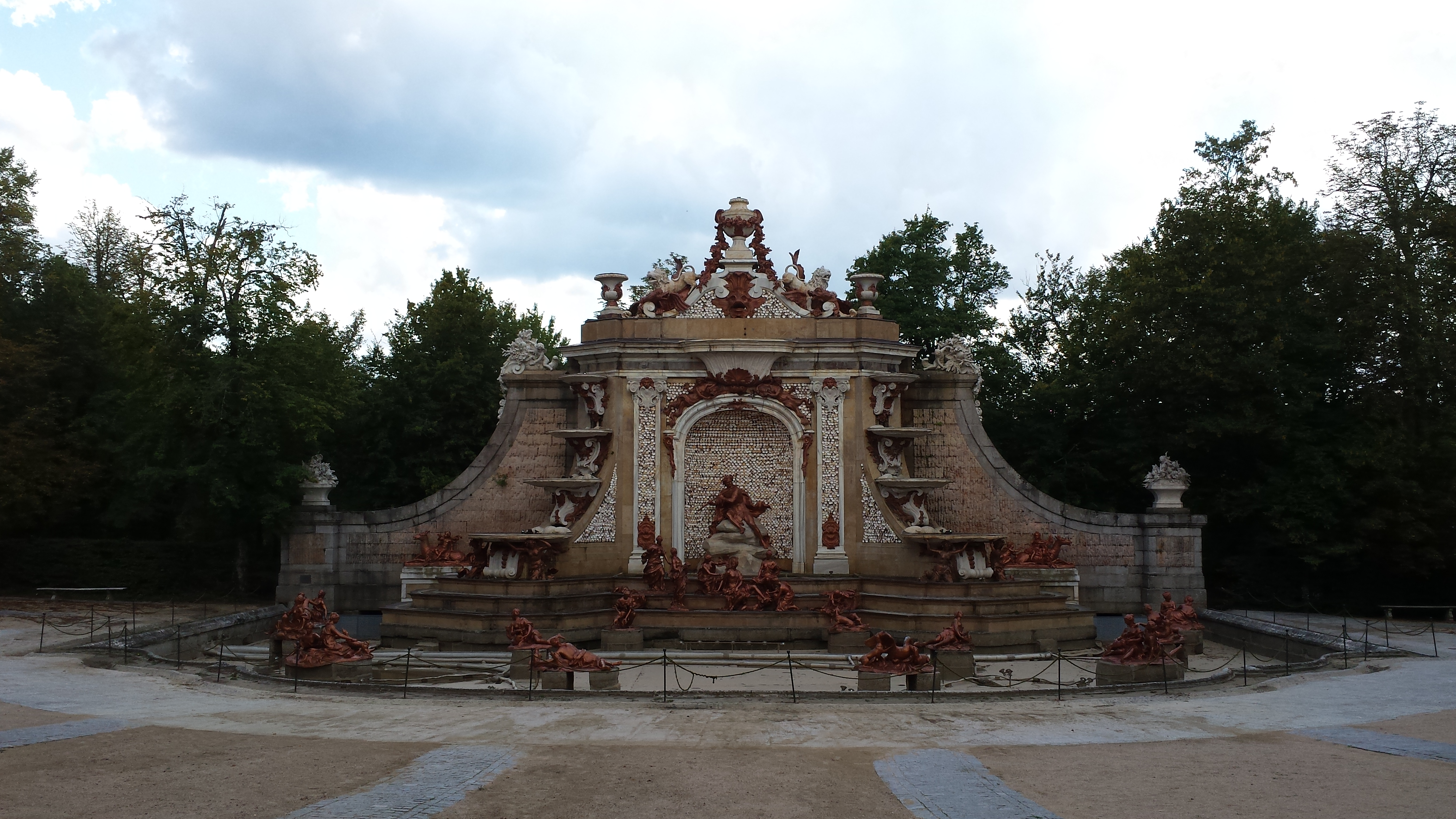 Leerer Springbrunnen im Park La Granja San Ildefonso